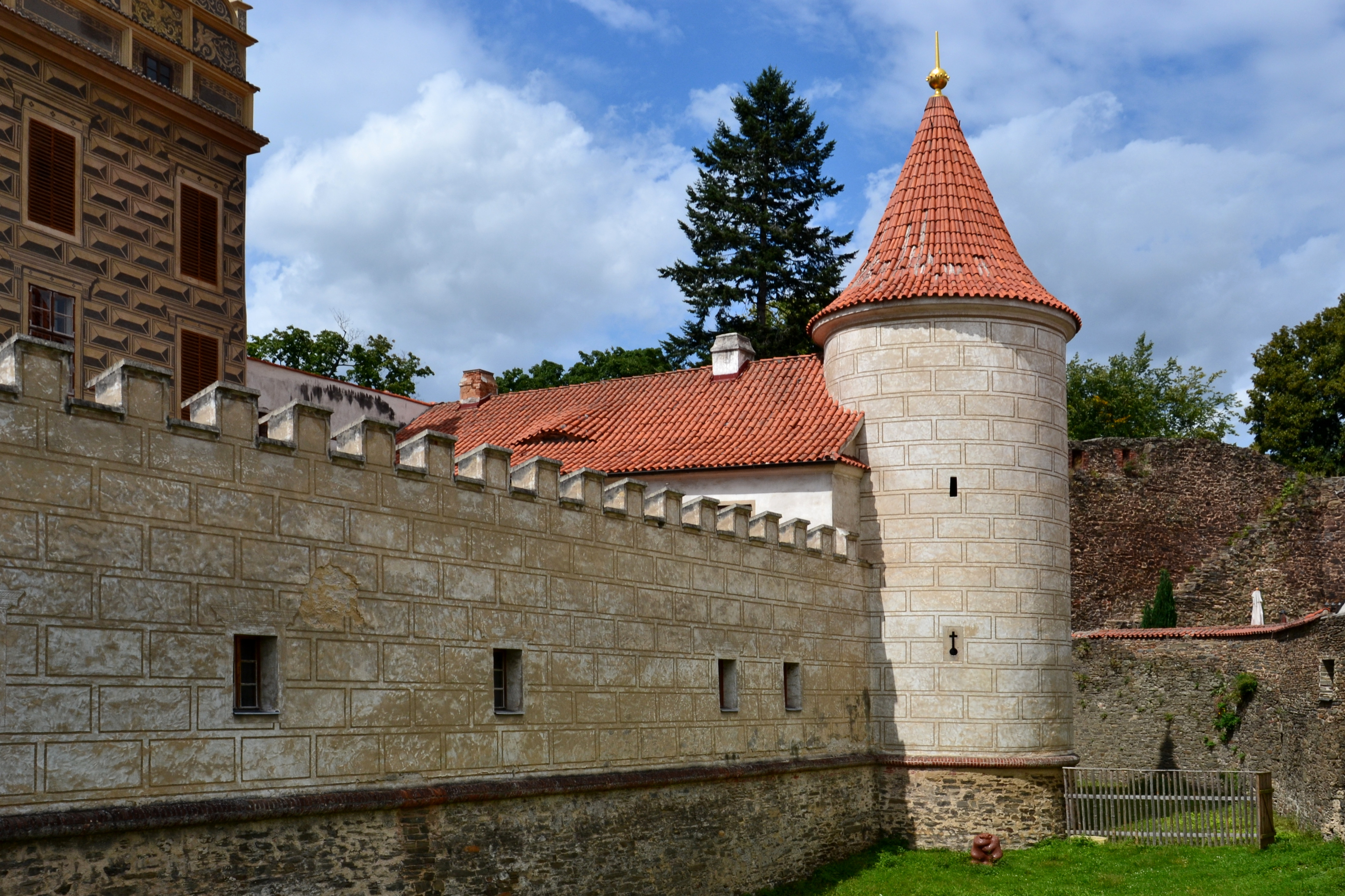 Horšovský Týn – severní věž